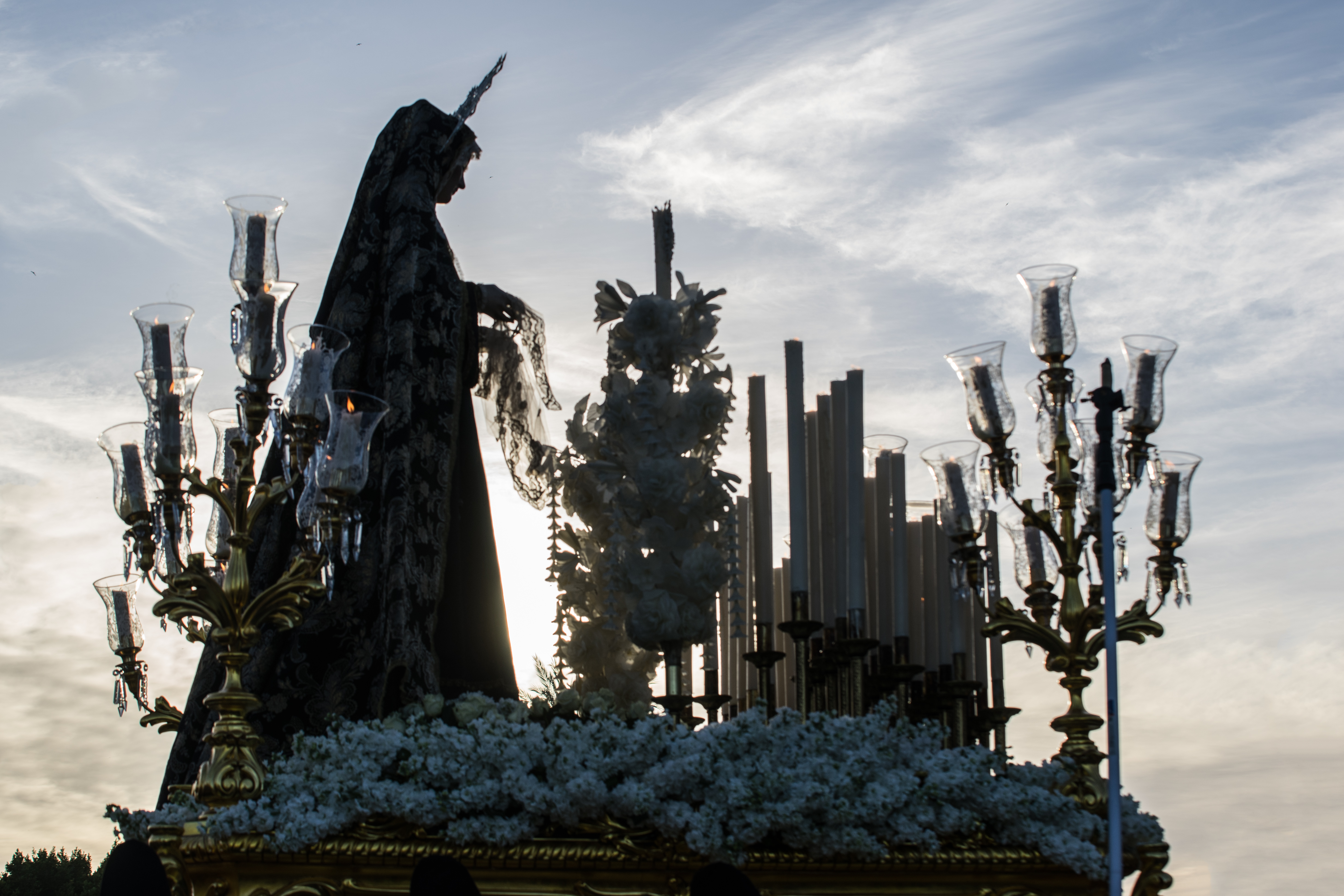 Procesión de la Sangre. Jueves Santo.Santísima Virgen de la Soledad del Calvario. Antonio Campillo This is a photography of a Folklore festival in Spain (Wikidata id Q5685566).